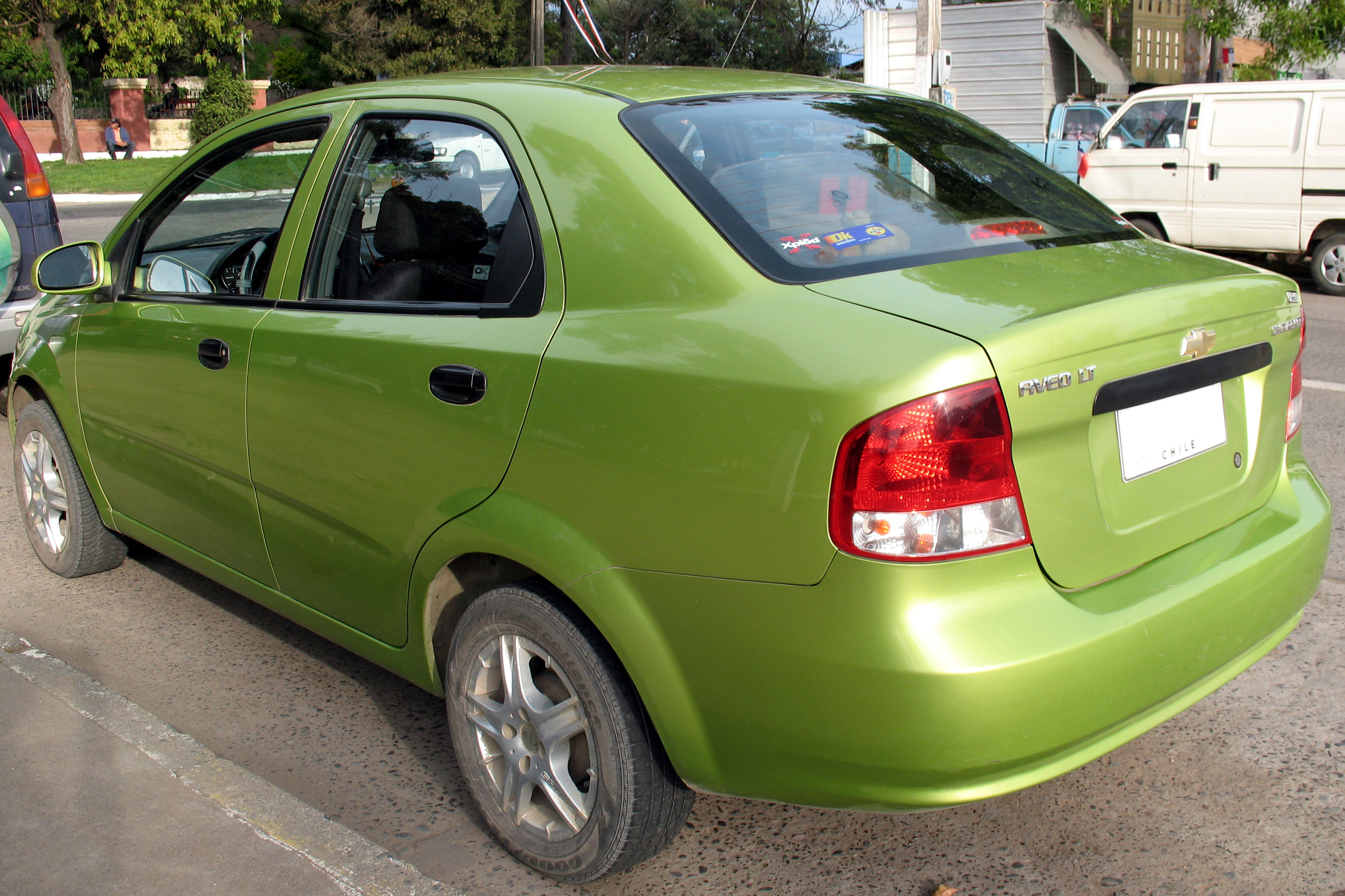 Chevrolet Aveo LT Sedan 2004